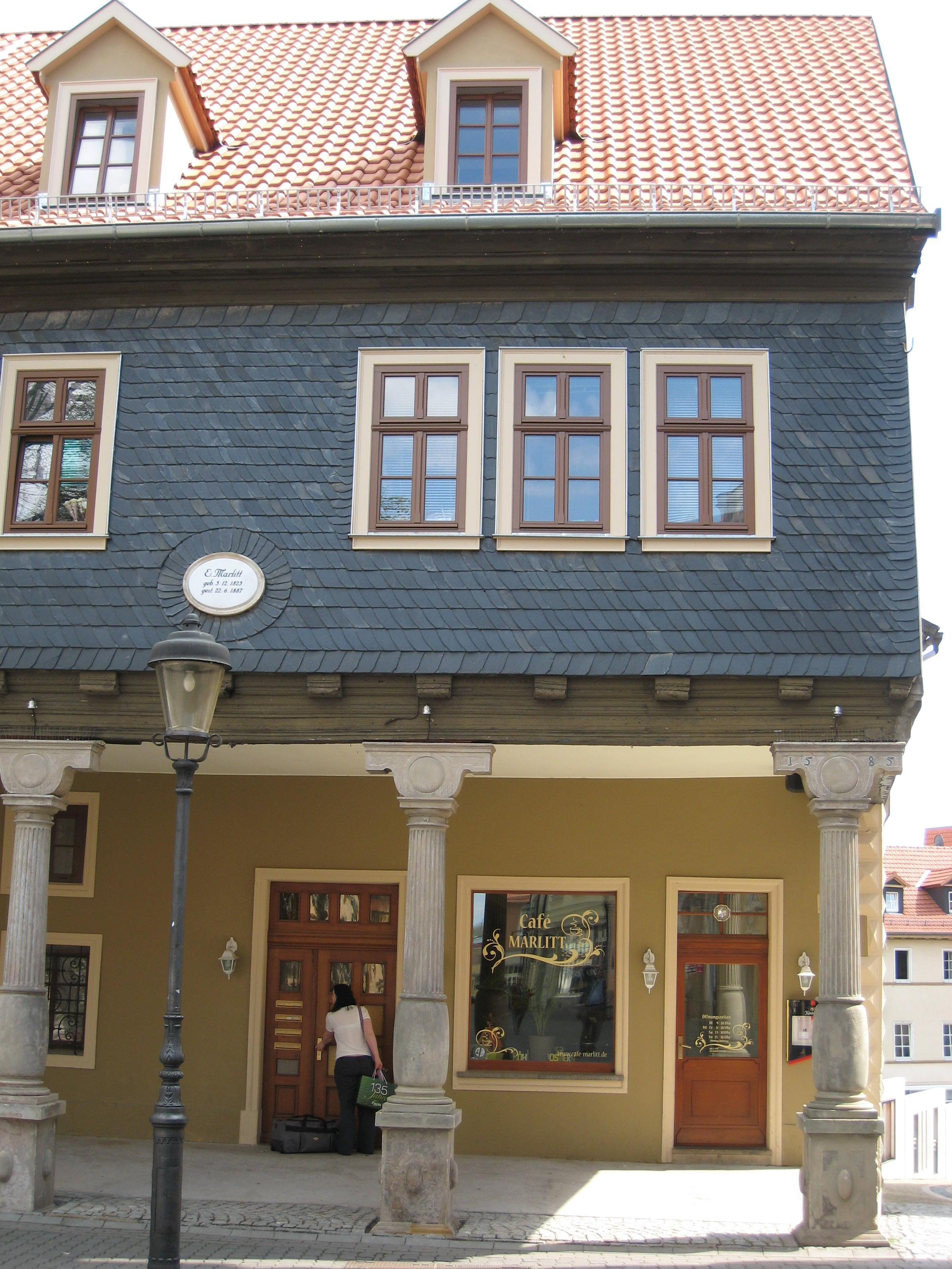 Das Kaffeehaus Marlitt am Markt in Arnstadt.